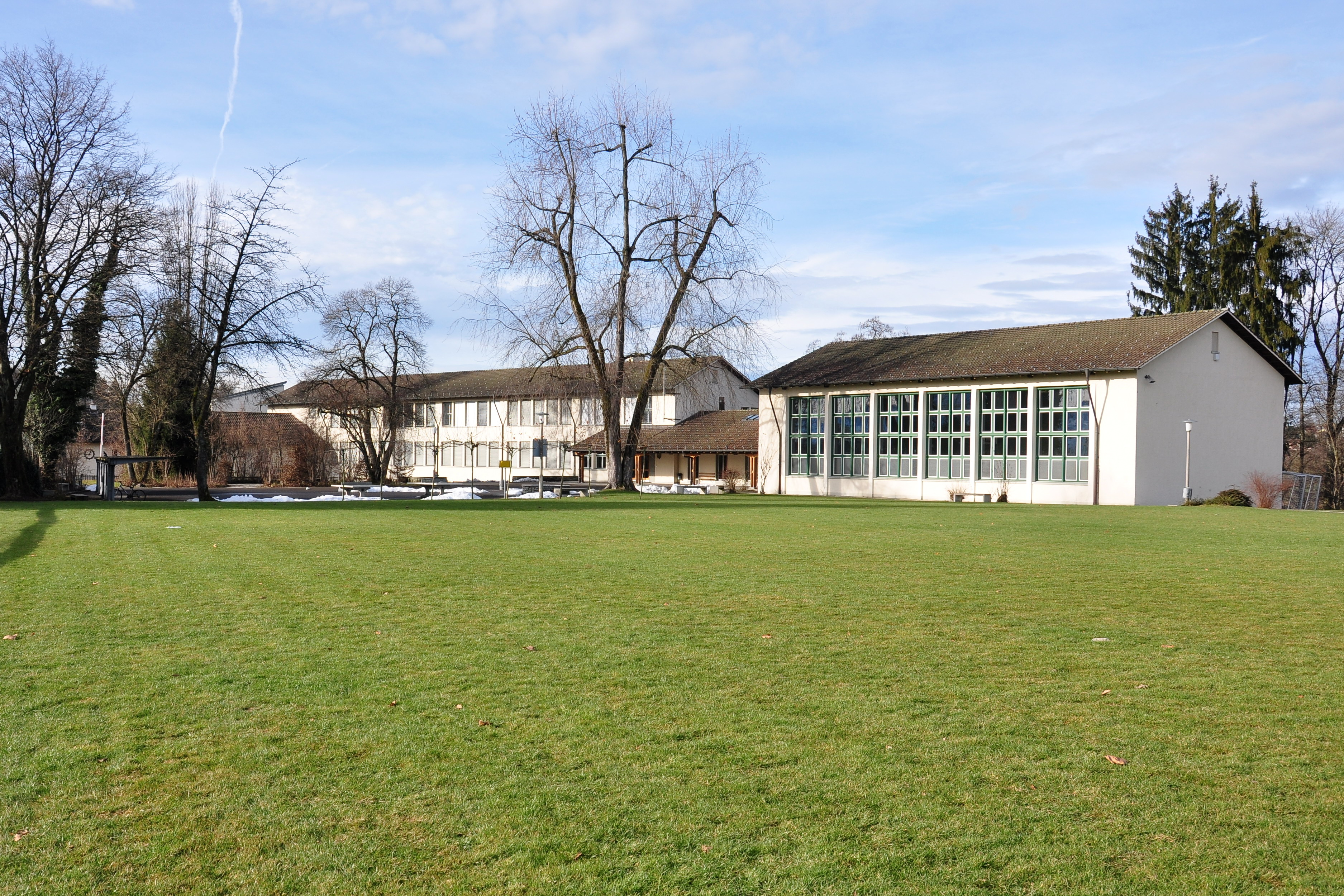 Schulhaus Schanz-Egg in Rüti (Switzerland)